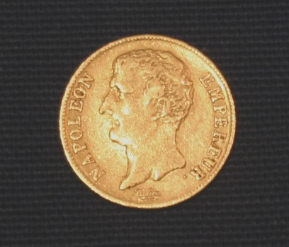 Konterfei Napoleons vor dessen Kaiserkrönung